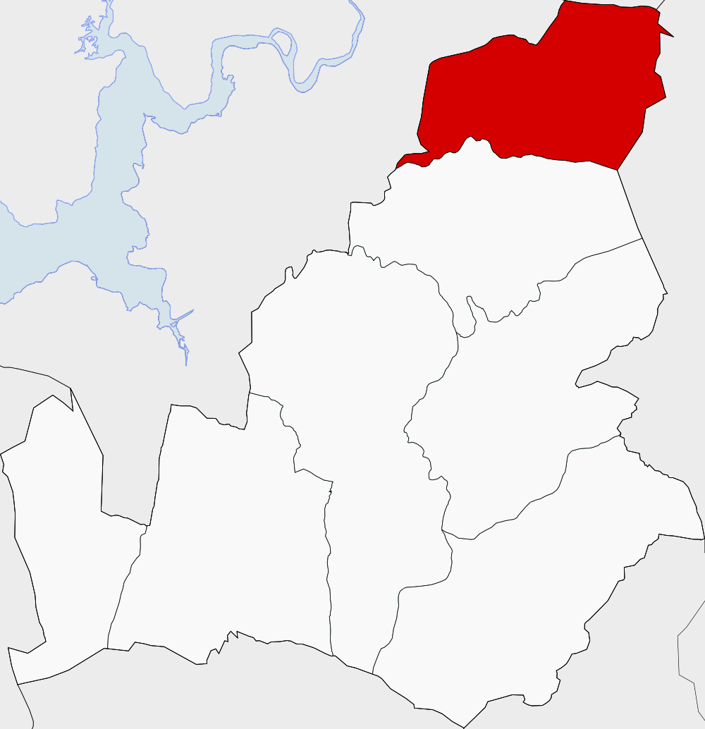 Extensión de la parroquia de Toxosoutos en Lousame